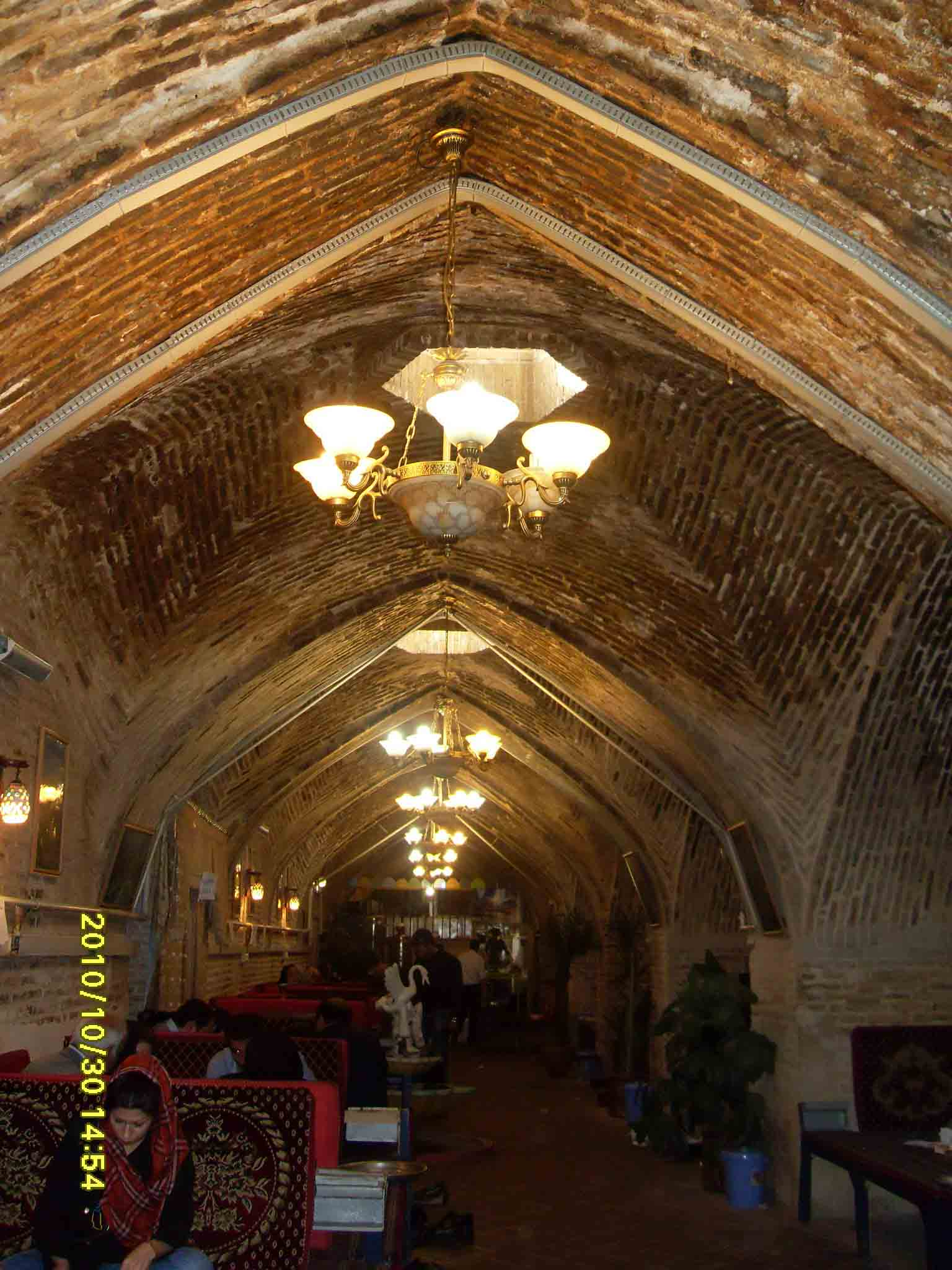 نمای داخلی